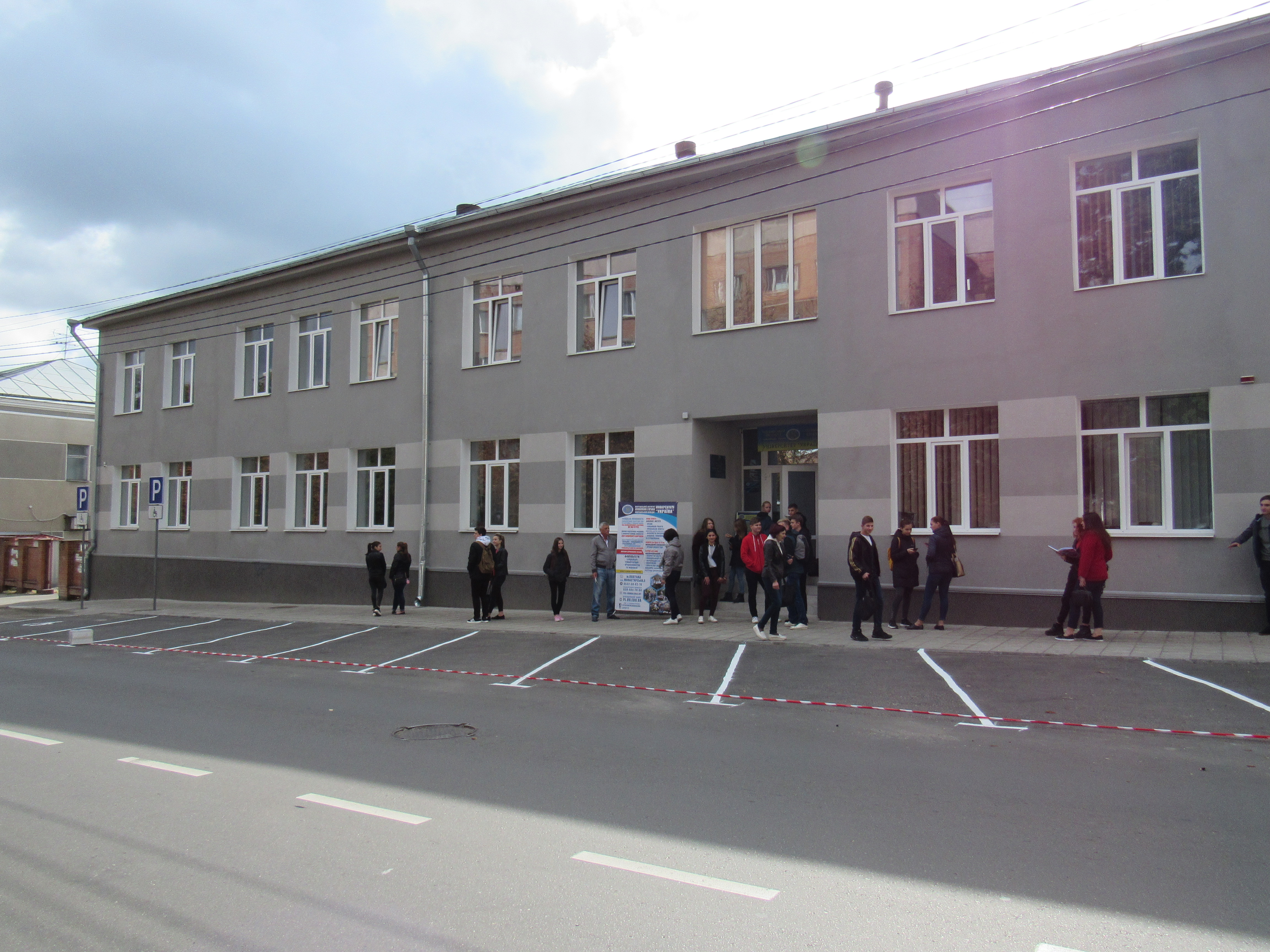 Будинок інституту